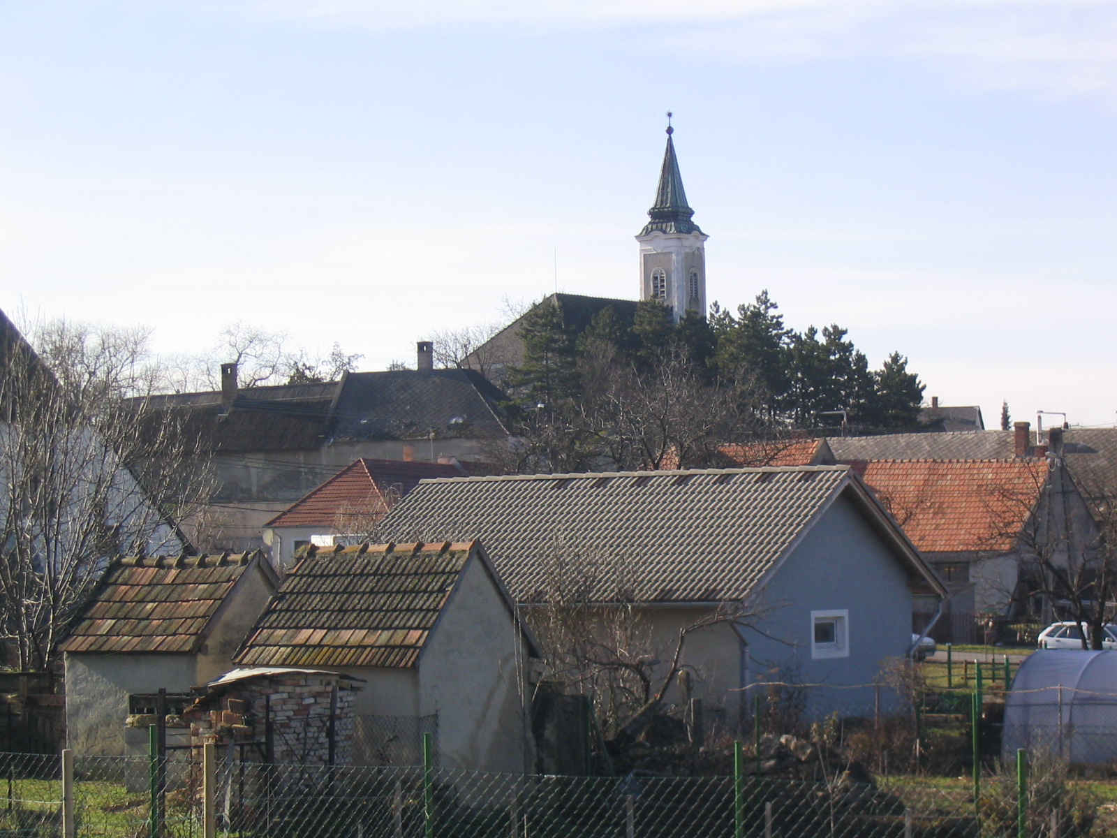 Kádárta református temploma